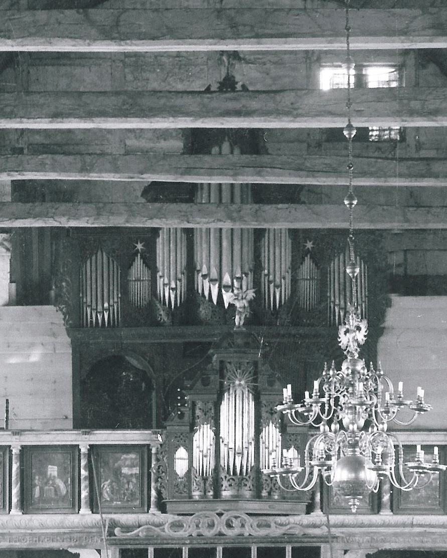 Orgel in der Dreieinigkeitskirche, Hamburg-Allermöhe, Deutschland